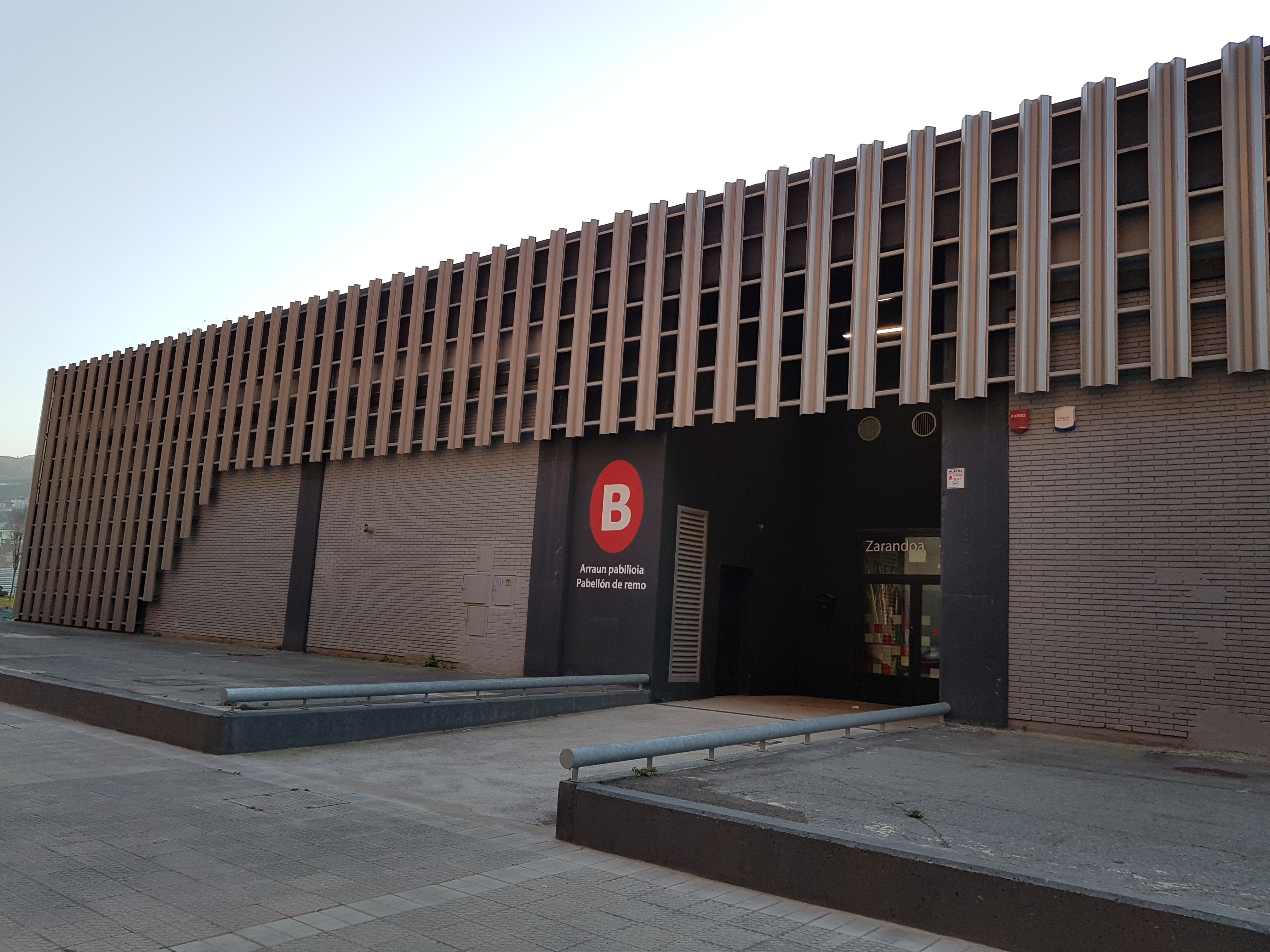 Nuevo pabellón de remo de Deusto.